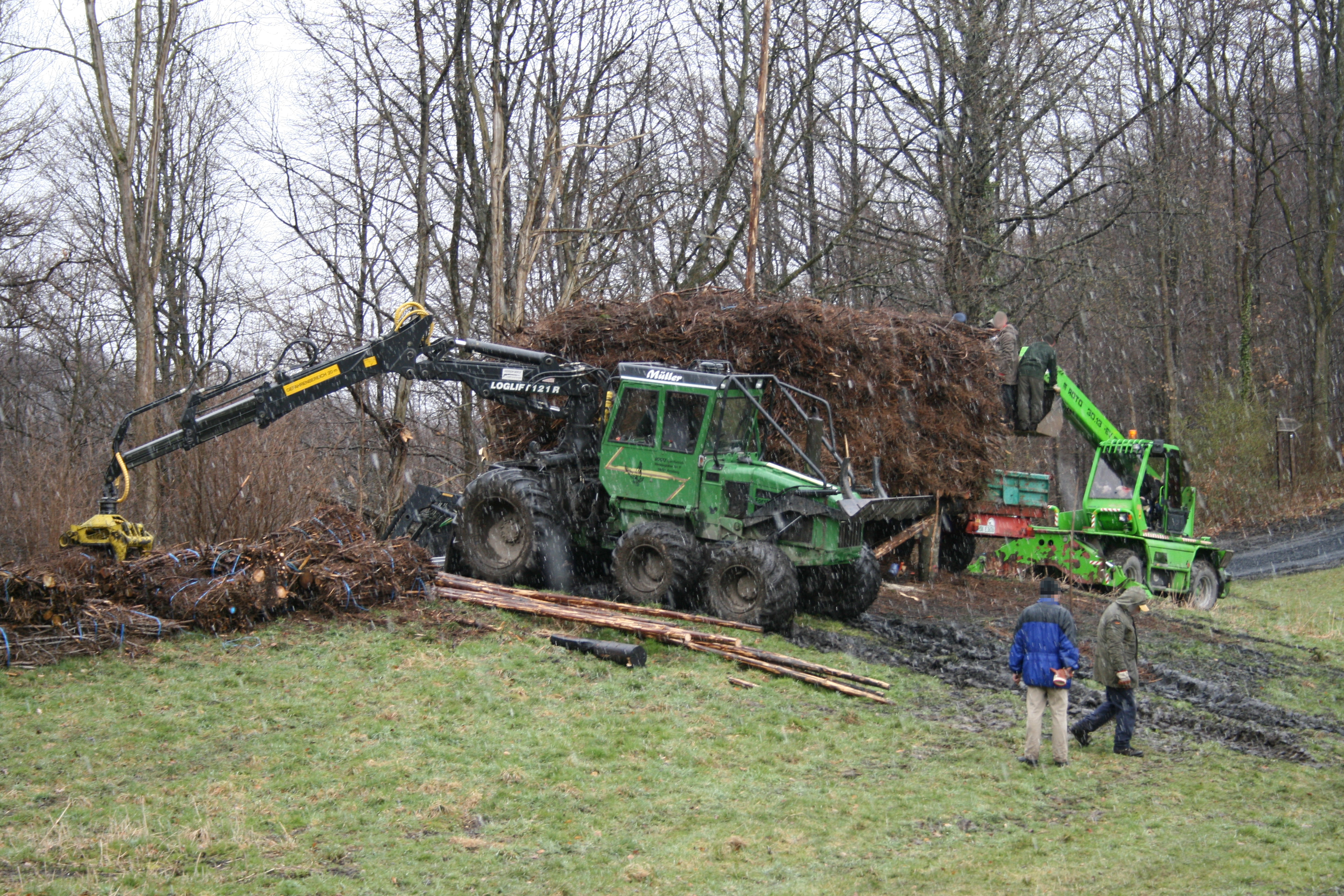 Aufbau des Arnsberger Osterfeuers bei Schnee